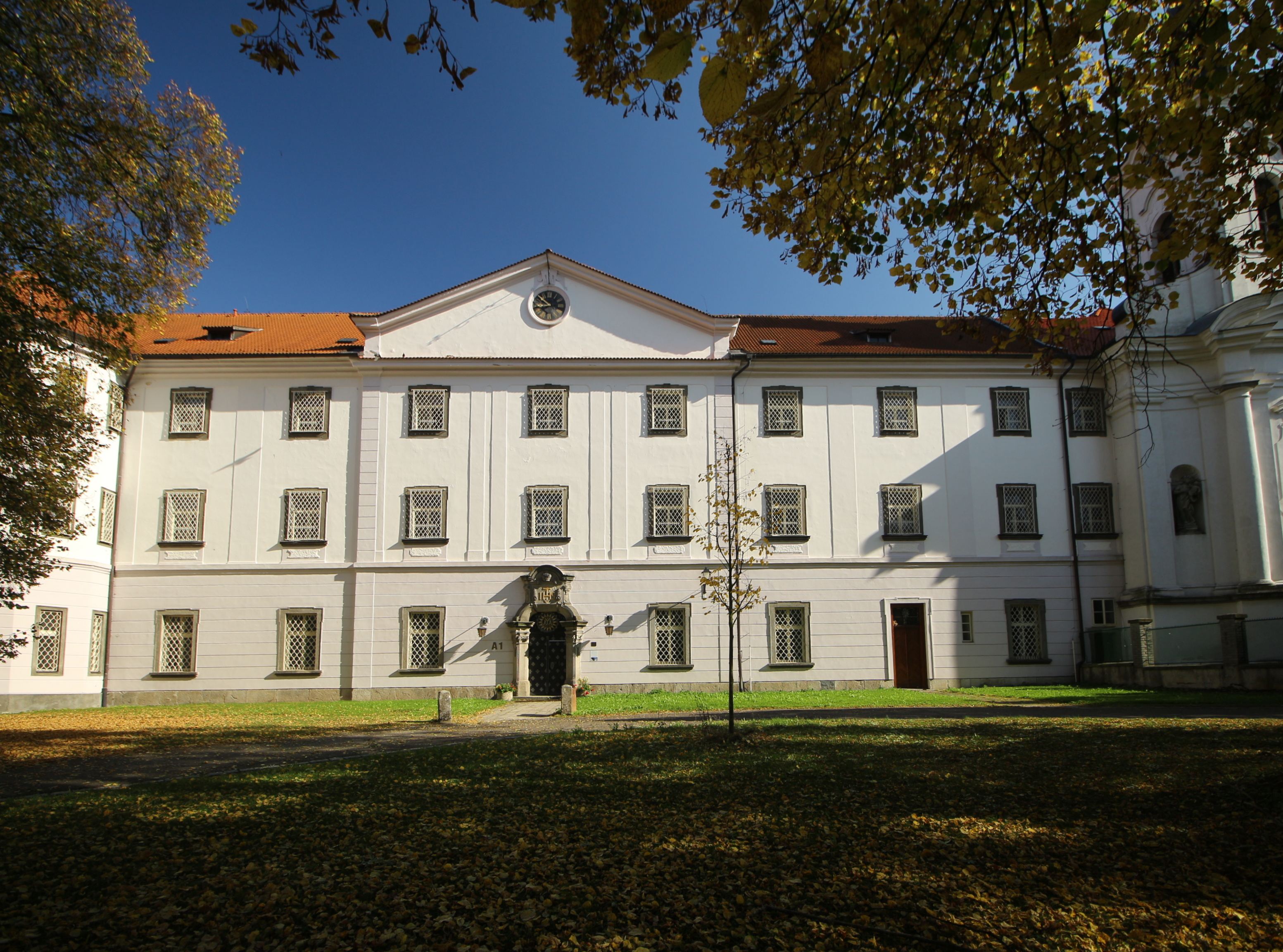 Opařany, okres Tábor